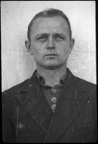 Peter Betz (* 12. Oktober 1913 in Theisenort im Landkreis Kronach; † im 20. oder 21. Jahrhundert) war SS-Hauptscharführer und wurde im KZ Dachau und Dora-Mittelbau eingesetzt. Im Dachau-Hauptprozess wurde Betz zu lebenslanger Haft verurteilt, das Urteil wurde später reduziert.